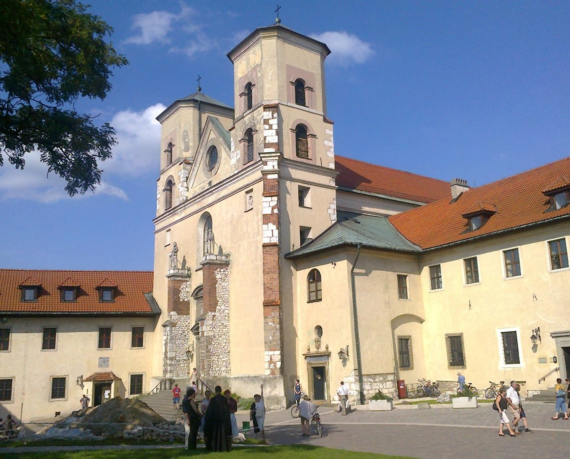 tynieckosciolek